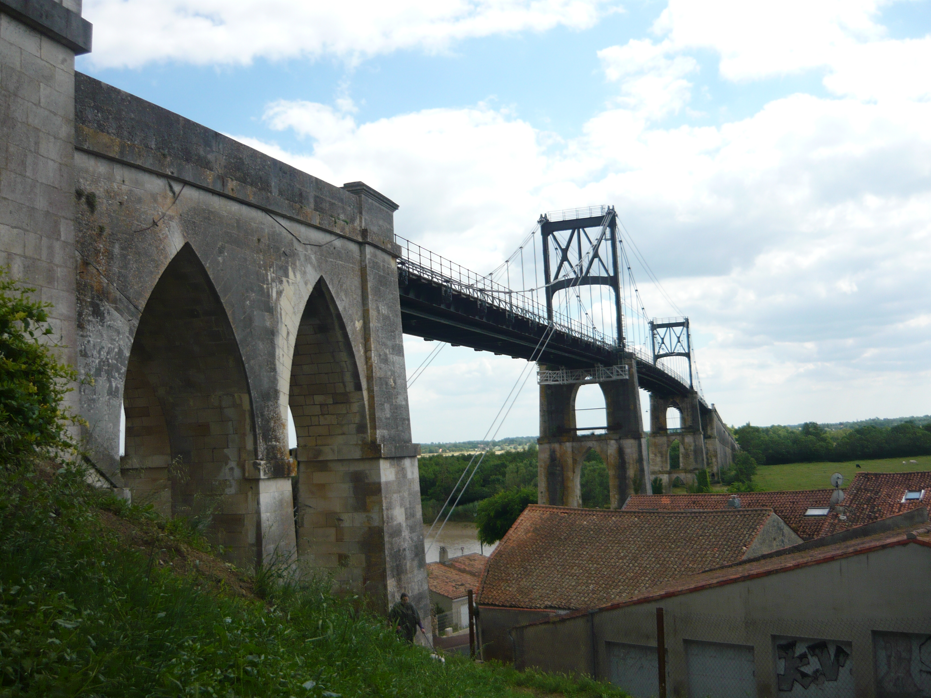 Le pont suspendu de Tonnay-Charente et les arches depuis la rive droite du fleuve